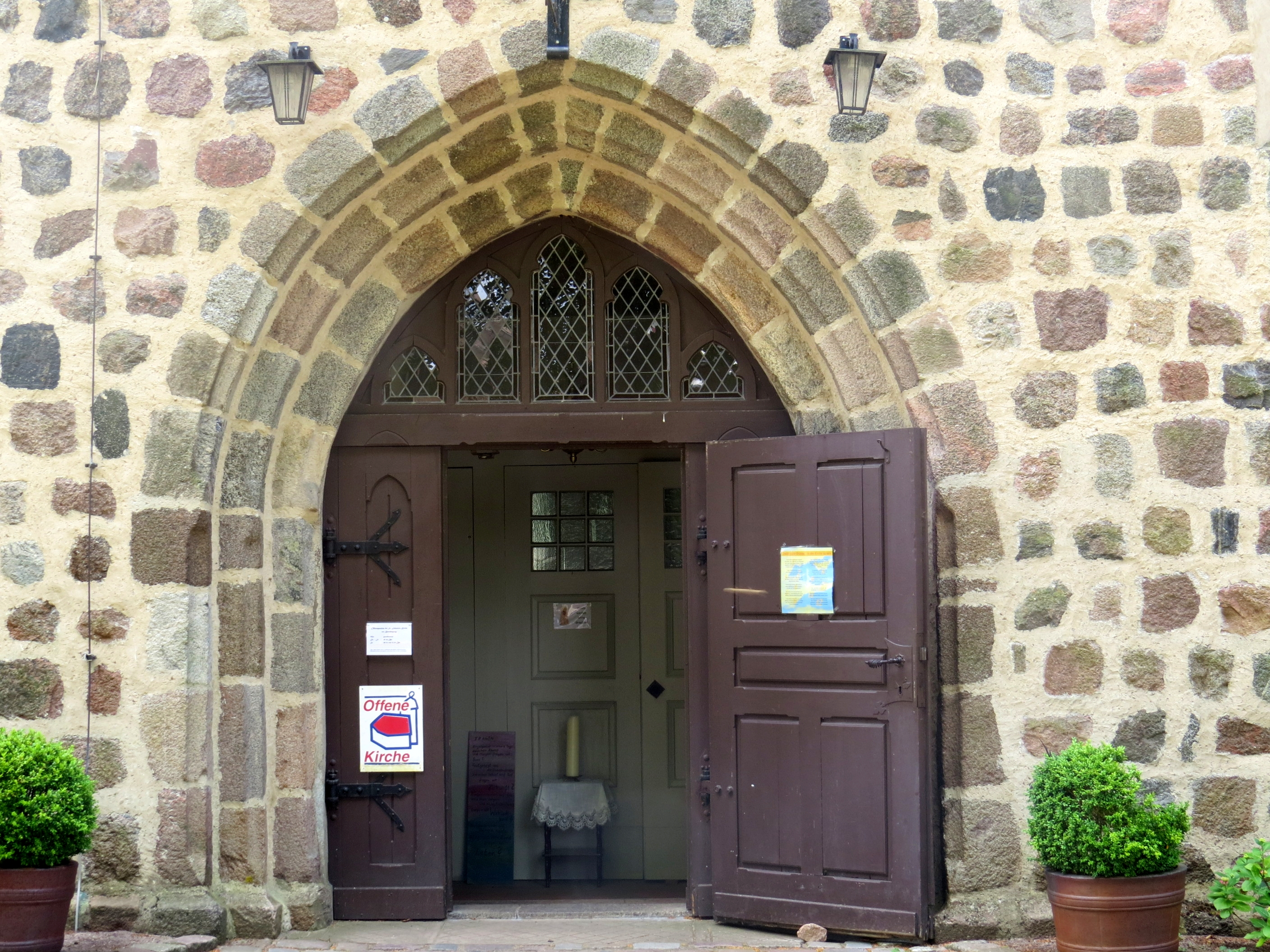 Haupteingang der St. Johanneskirche